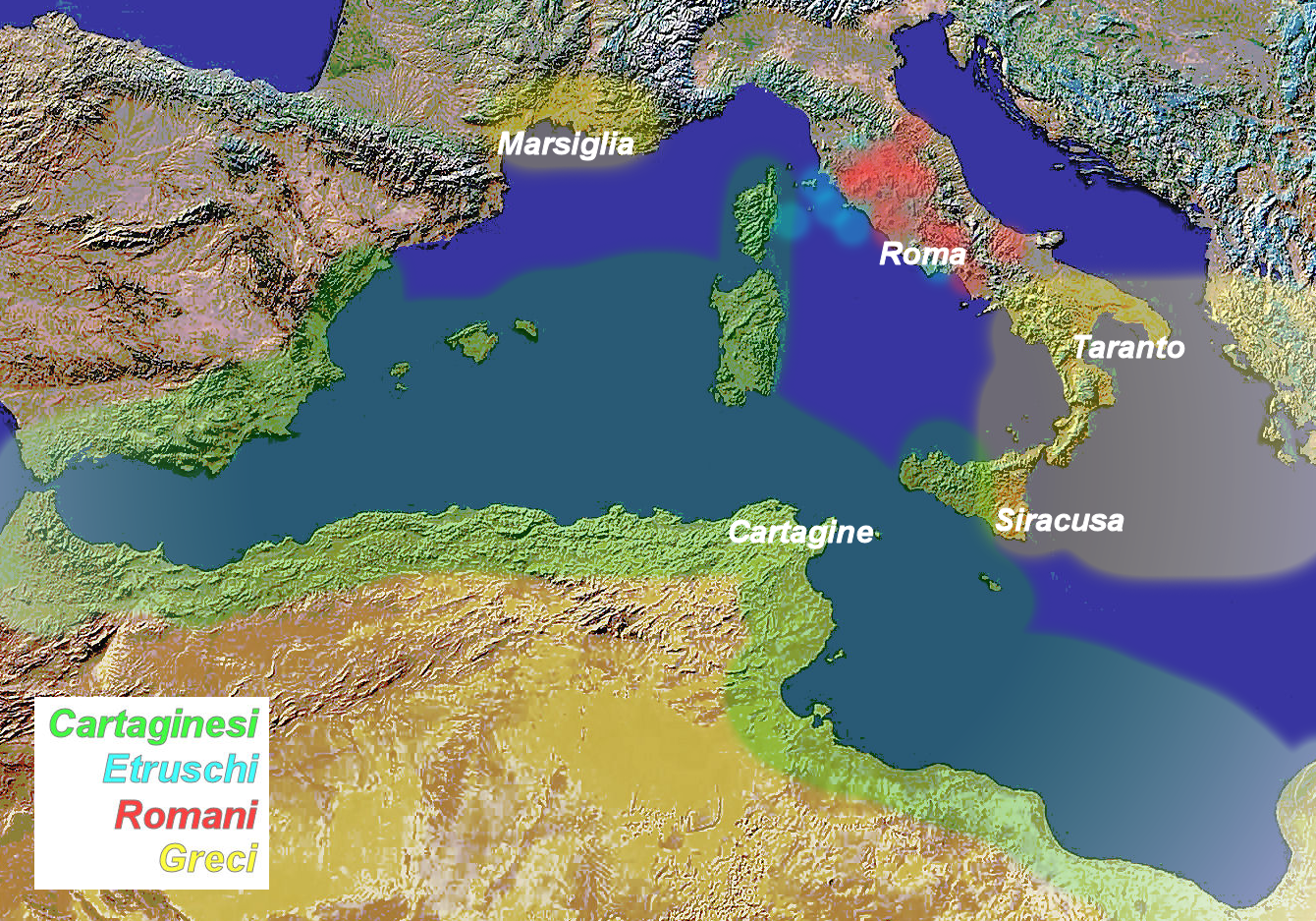 Main areas of influence in West Mediterranean Sea in 306 BC. Principali aree di influenza nel Mediterraneo Occidentale nell'anno 306 aC (Terzo Trattato Roma-Cartagine).